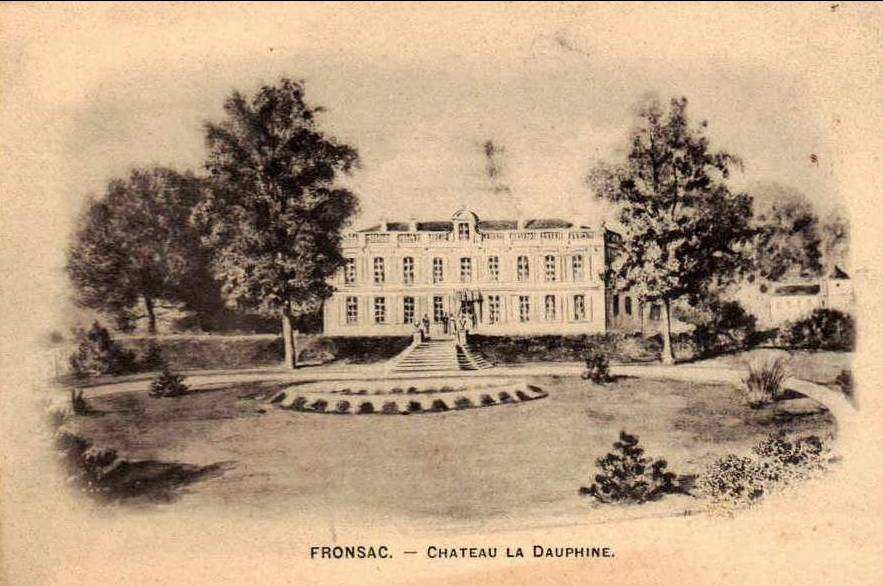 Fronsac on post-cards